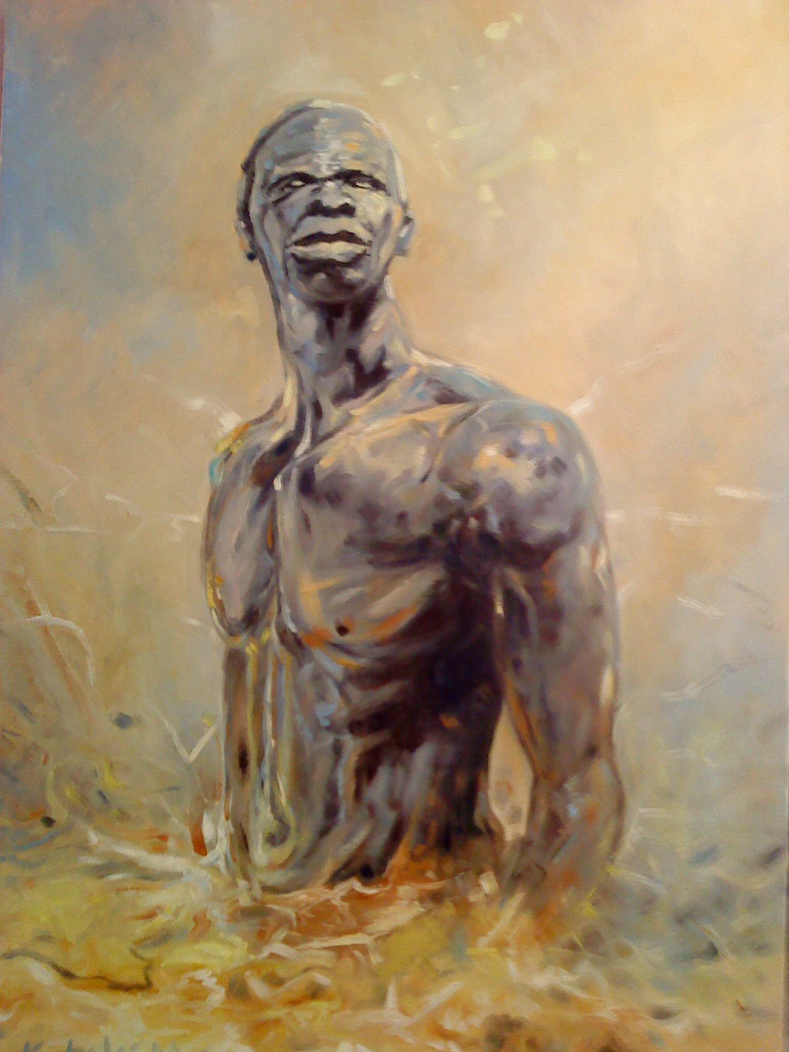 Amistad ‘’- rok 1998, 105x70 - olej na płótnie , fotografia Marek Kubski